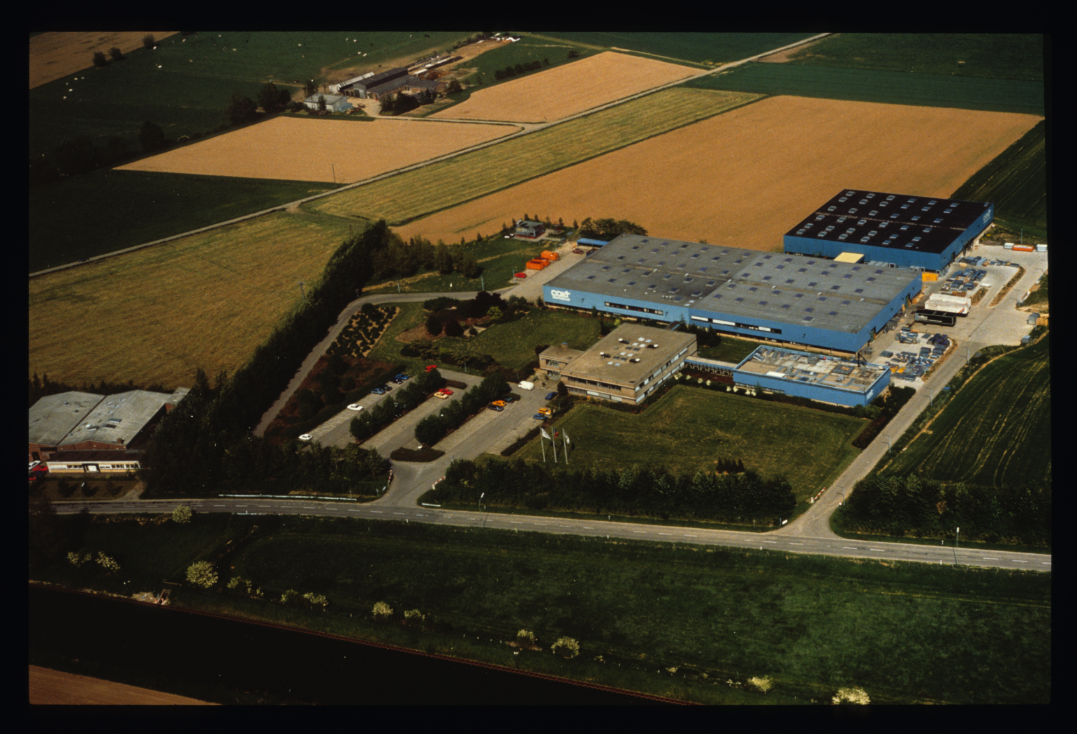 Luftaufnahme Colt Kleve